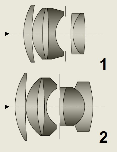 Frühe 50-mm-Sonnar-Objektive Linsenschemata (übernommen aus der russischsprachigen Wikipedia, neu zusammengestellt und grafisch angepasst) 1) Sonnar 1 : 2 f = 5 cm Carl Zeiss Jena (Ludwig Bertele, 1932) 2) Sonnar 1 : 1,5 f = 5 cm Carl Zeiss Jena (Ludwig Bertele, 1932)